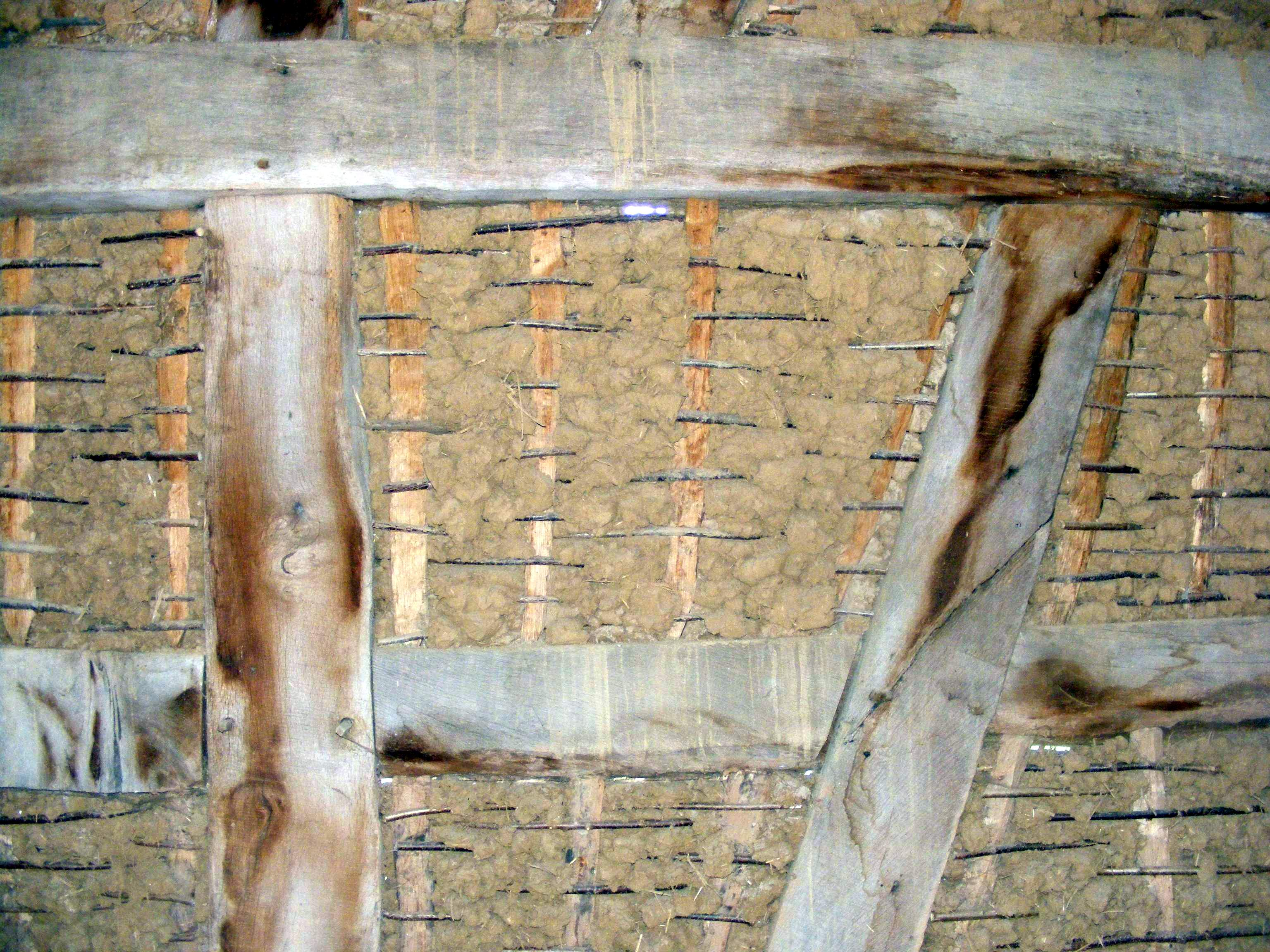 Fachwerk Ausfachung mit Holzknüppeln und Lehm im Freilichtmuseum Kommern, Eifel